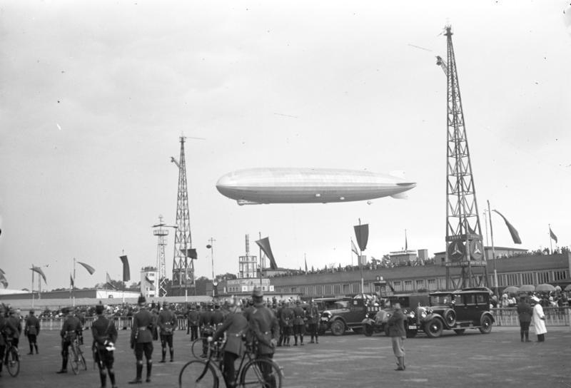 Luftschiff "Graf Zeppelin" von der Nordpolfahrt zurück auf dem Flughafen Berlin-Tempelhof